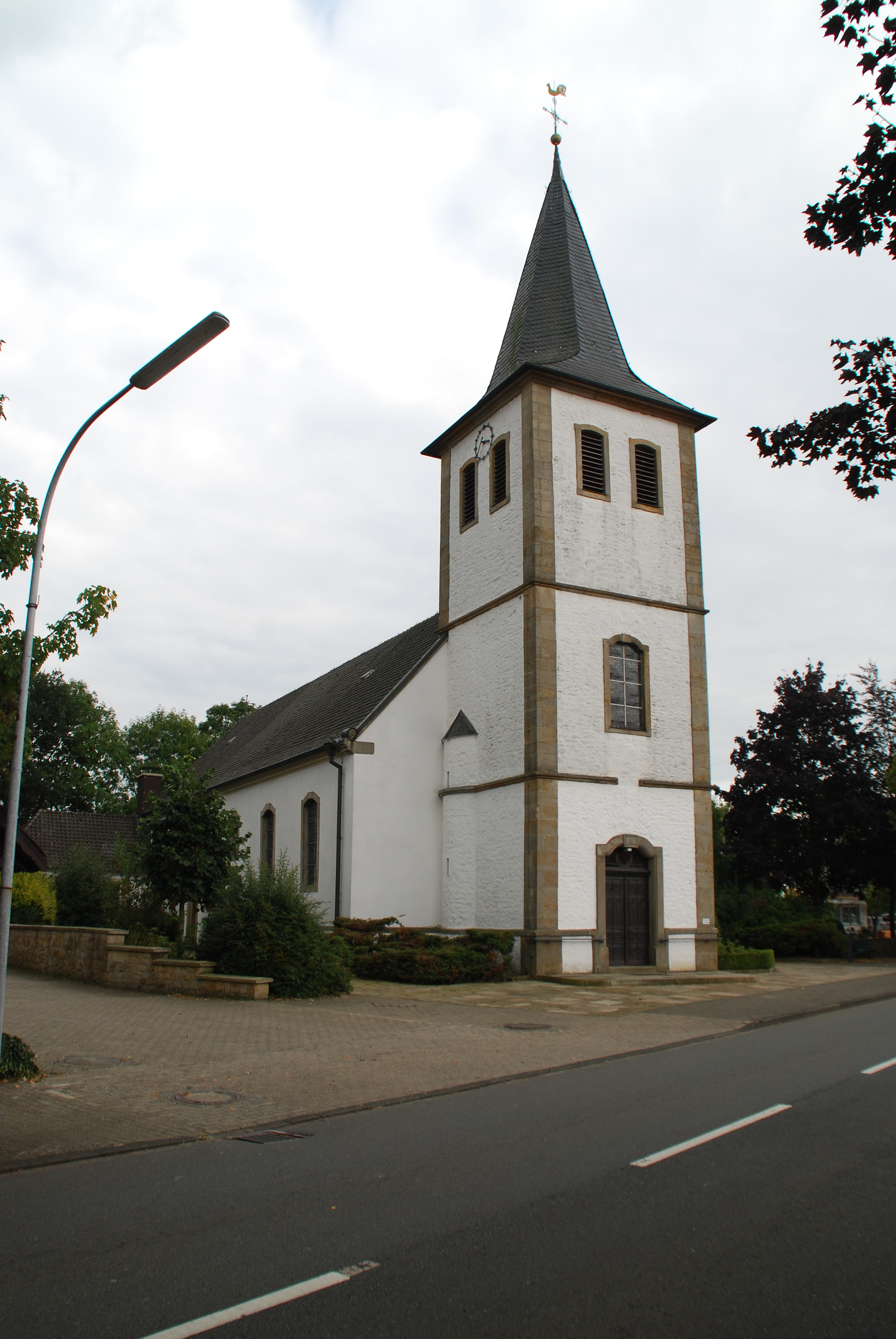 Römisch-katholische Pfarrkirche St. Peter und Paul in Halverde, Ortsteil von Hopsten, Kreis Steinfurt, Nordrhein-Westfalen, Deutschland. This is a photograph of an architectural monument.